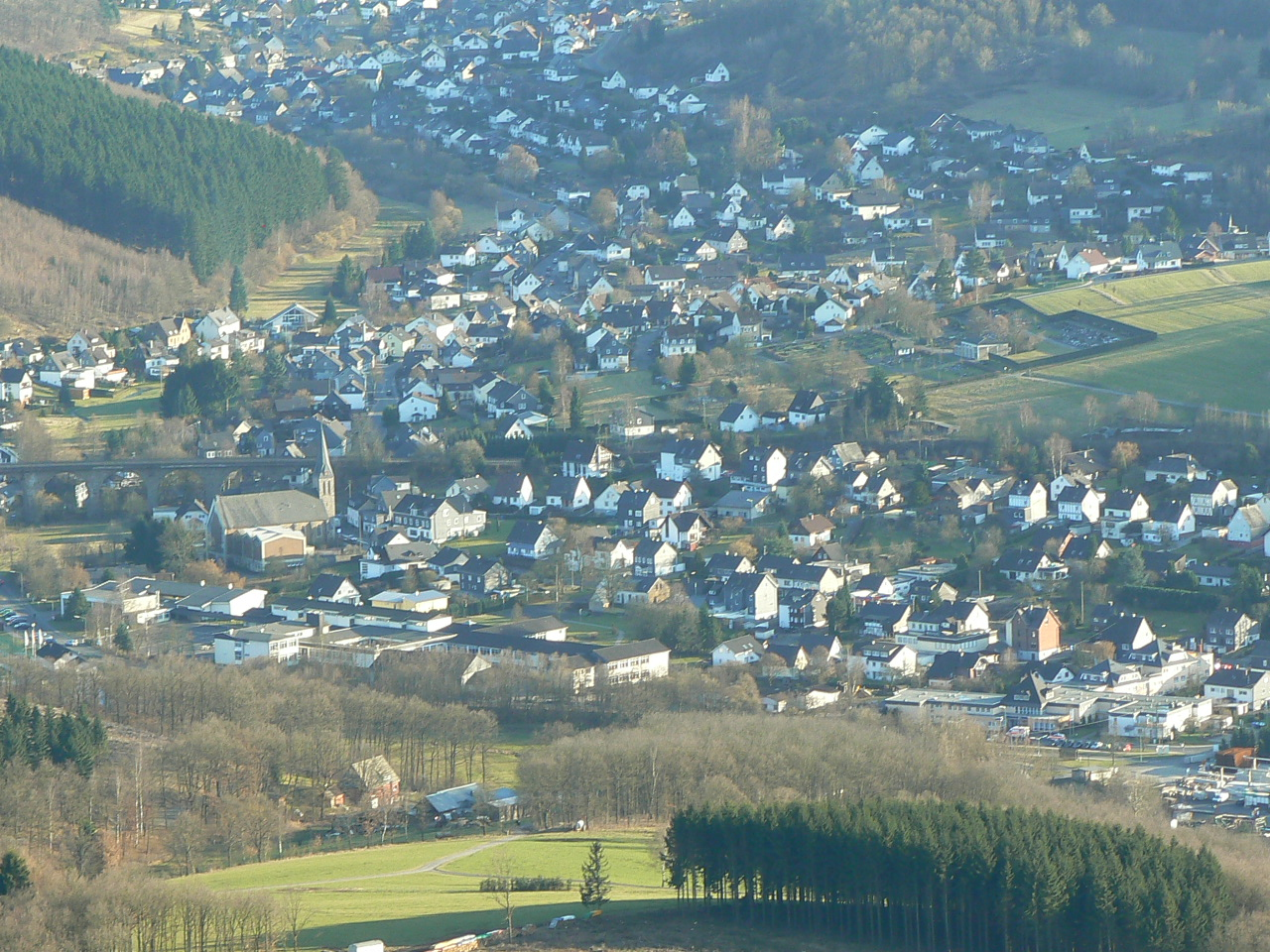 Der Ortskern von Niederdielfen aus der Vogelperspektive